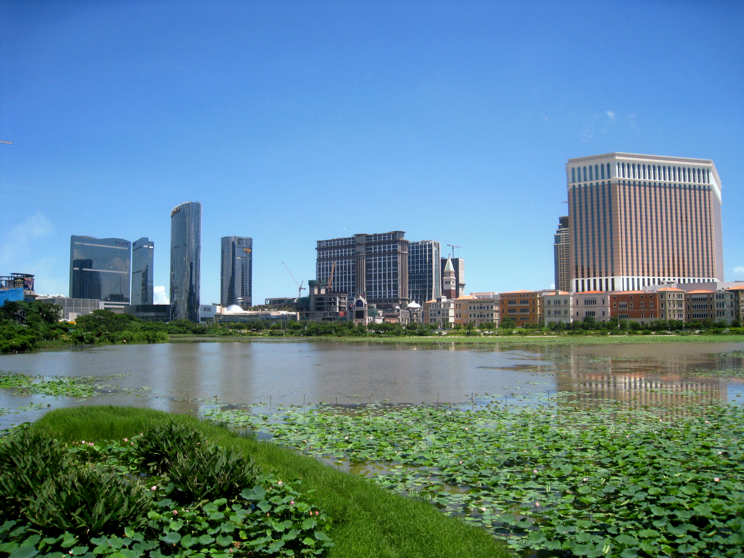 Macao Cotai Strip 路氹金光大道酒店項目